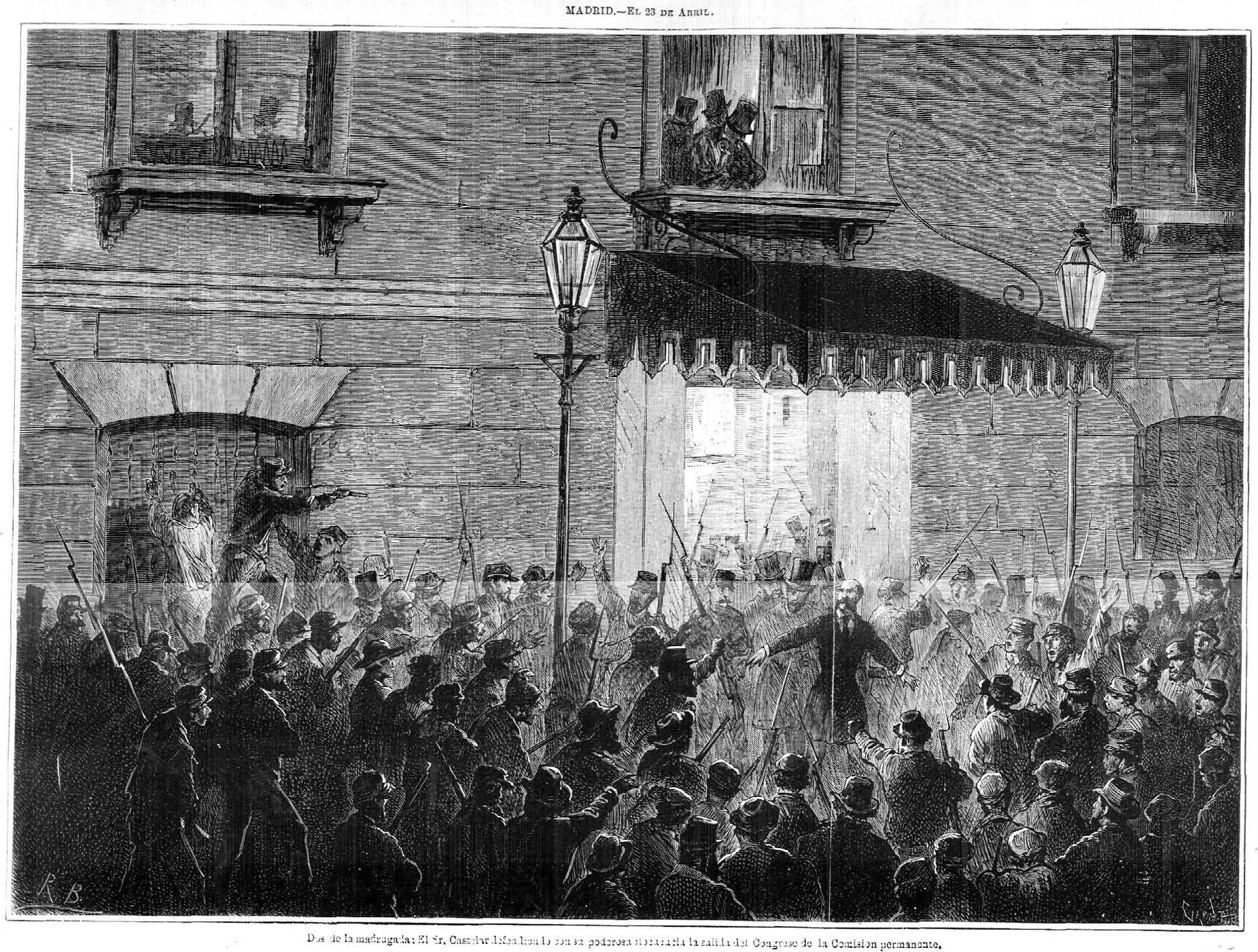 Dos de la madrugada, 23 de abril de 1873, el señor Castelar defendiendo con su poderosa ¿elocuencia? la salida del Congreso de la Comisión Permanente, 23 de abril, Madrid, en la revista española La Ilustración Española y Americana.